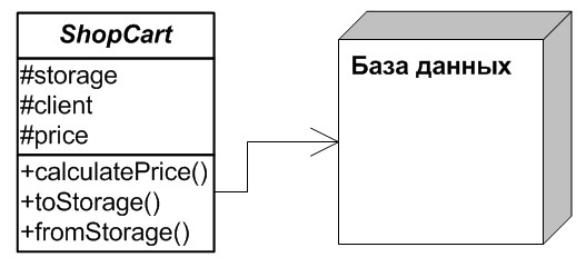 Пример класса, который подаёт признаки нарушении SRP принципа.